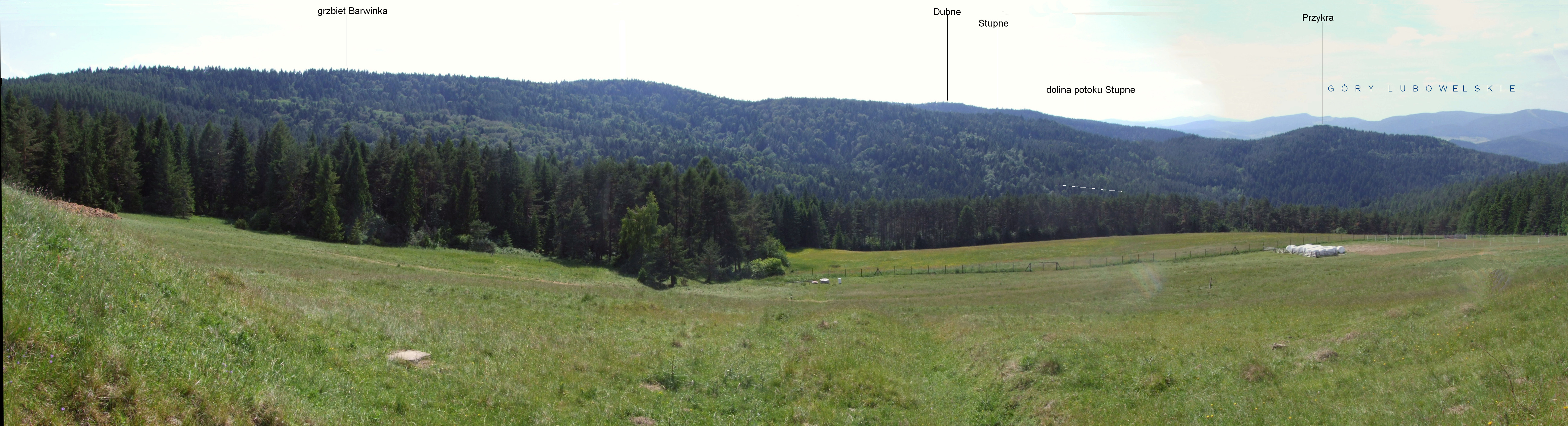 Widok ze wzgórza Roztoka nad Wojkową